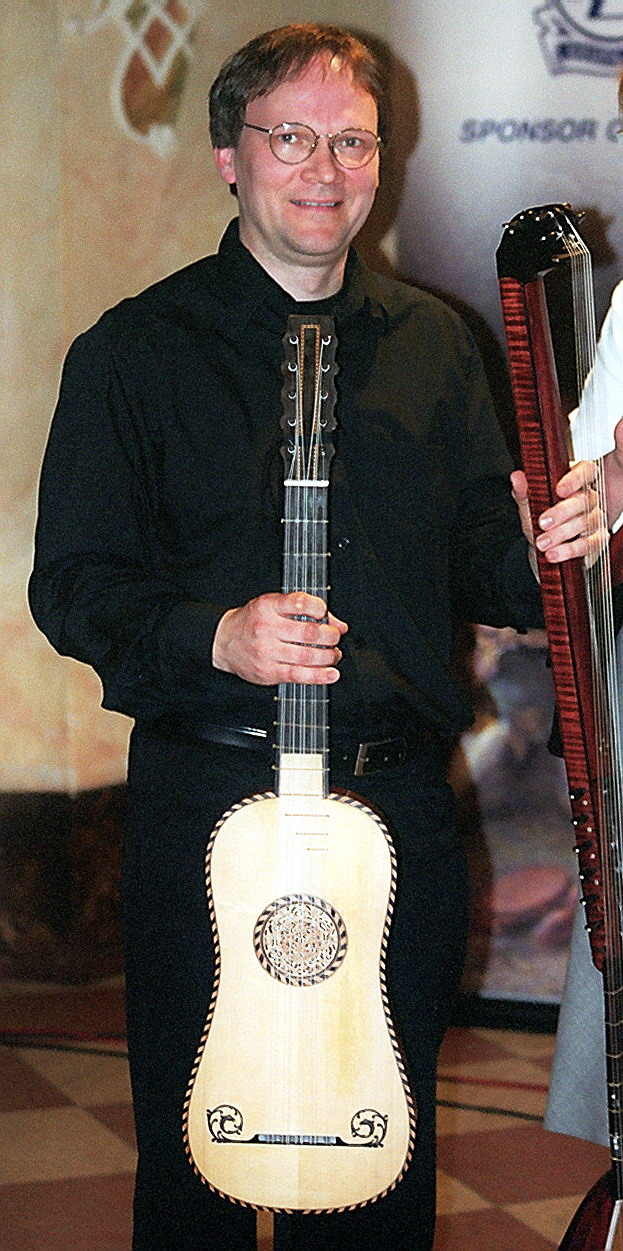 Eero Palviainen, Wrocław (Poland) 2004